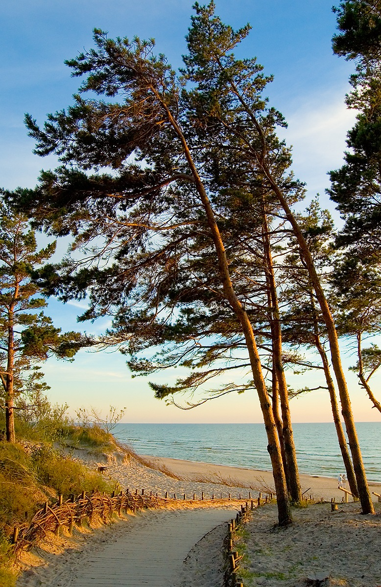 Palanga, Baltic Sea 2007